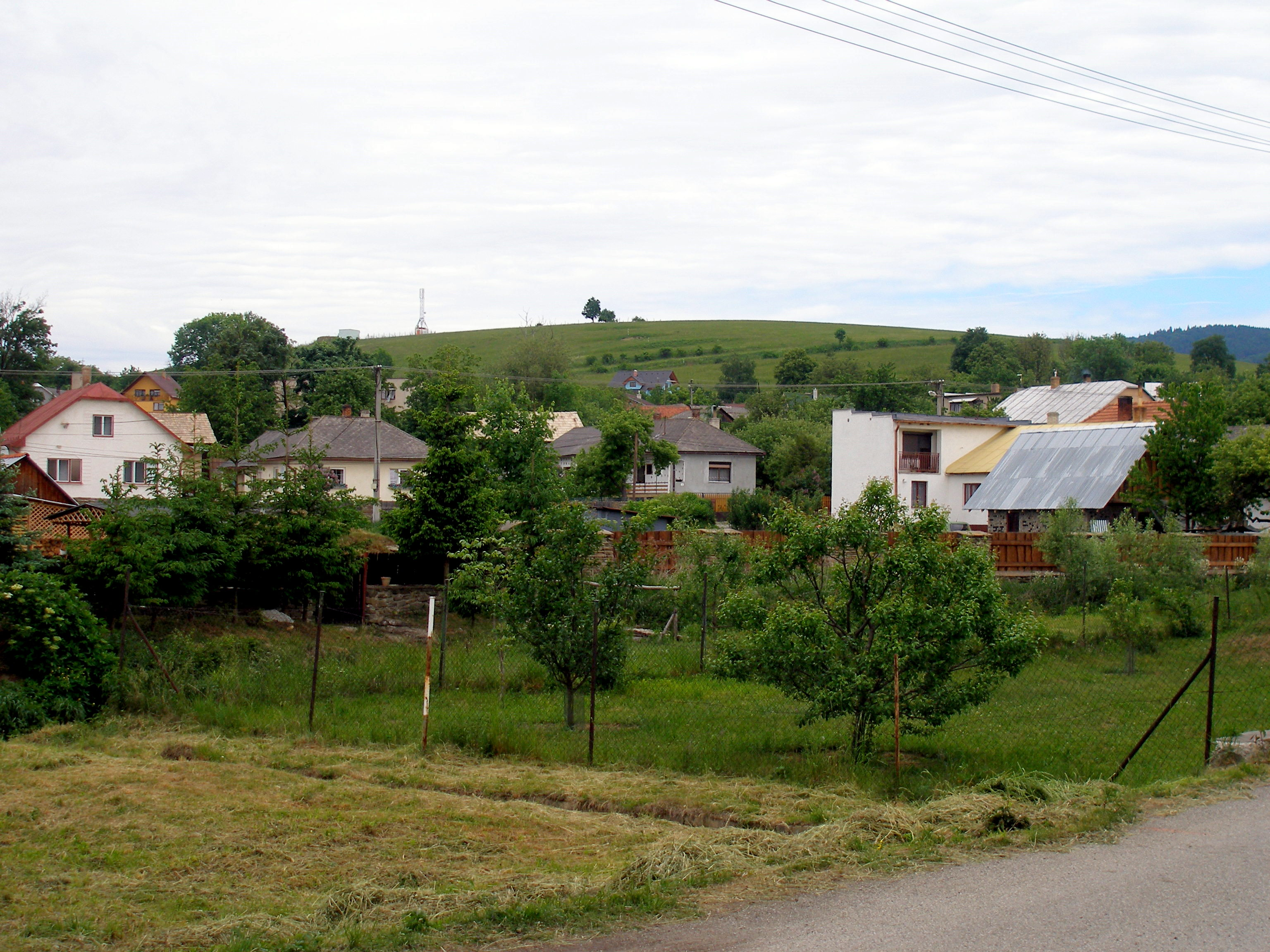 Obec Krivany okres Sabinov